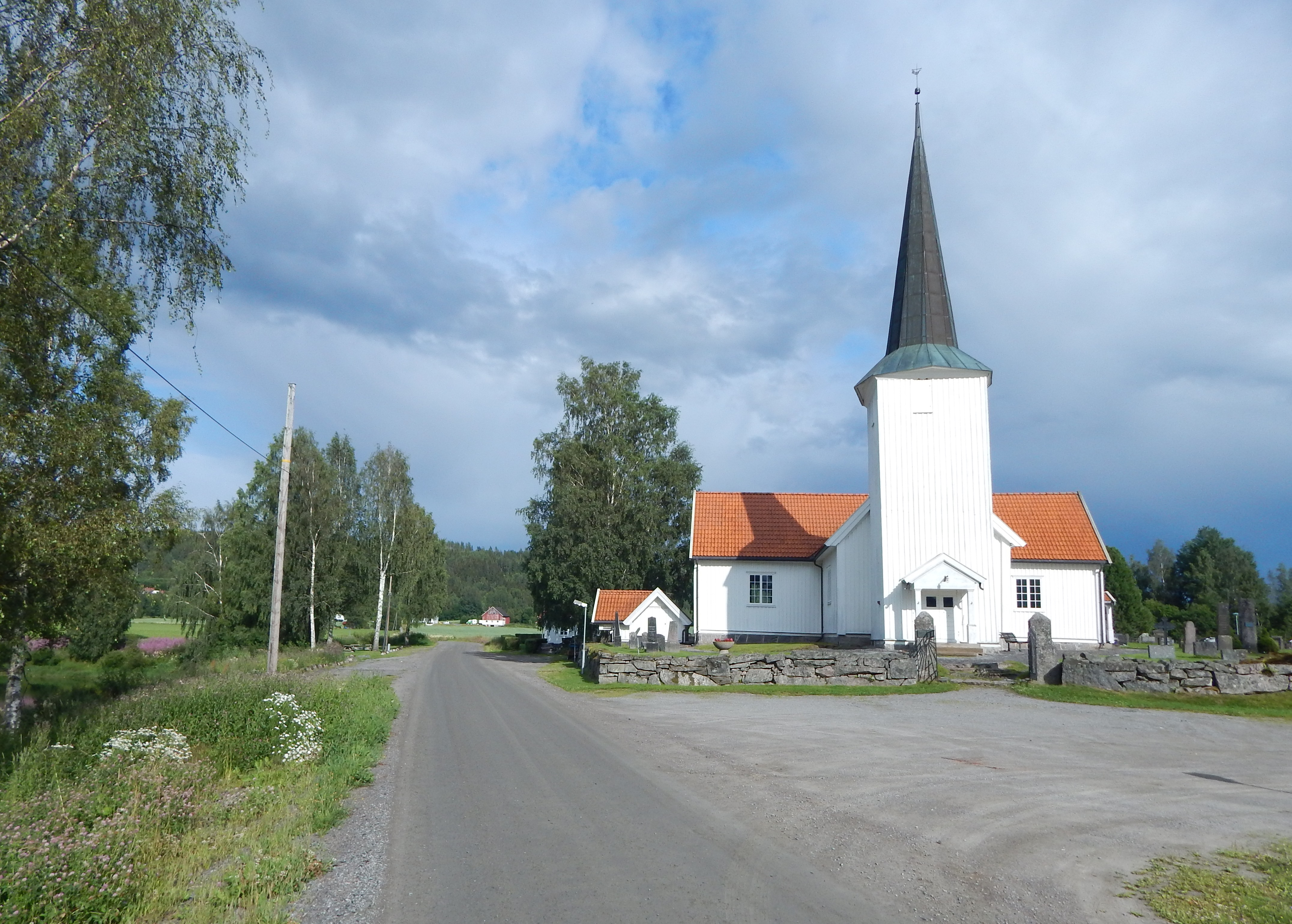 Kirkevegen (fylkesvei 1938, tidl. 284) ved Oppstad kirke